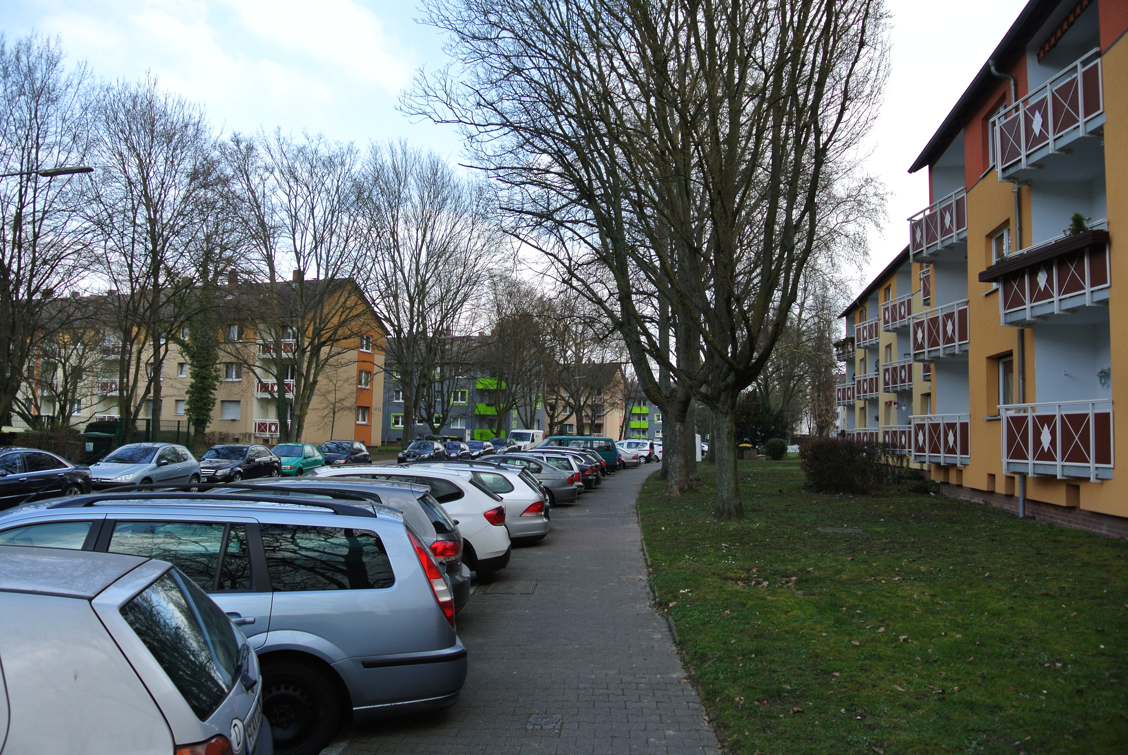 Siedlung Sigmund-Freud-Straße Frankfurt-Eckenheim Südabschnitt Blick nach Norden